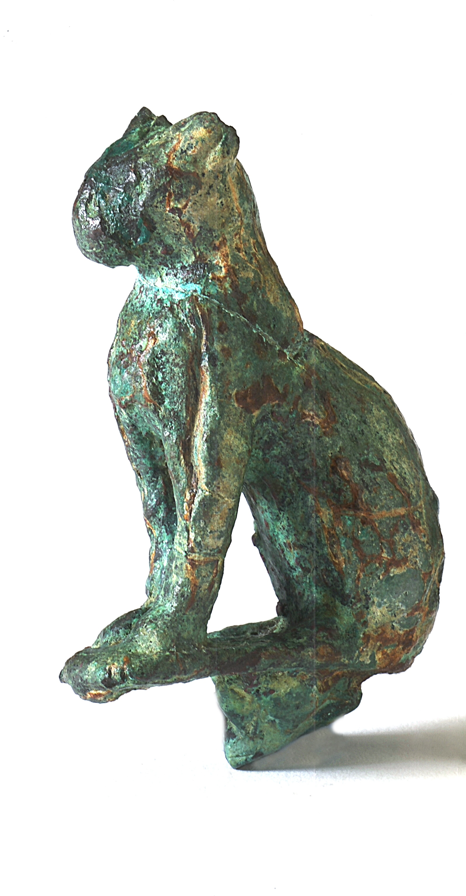 Figura zoomorfa cómo representación de la diosa Bastis en su iconografía de gato sentado.